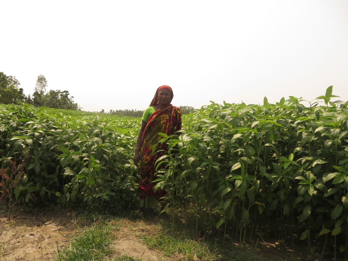 Jute field visit